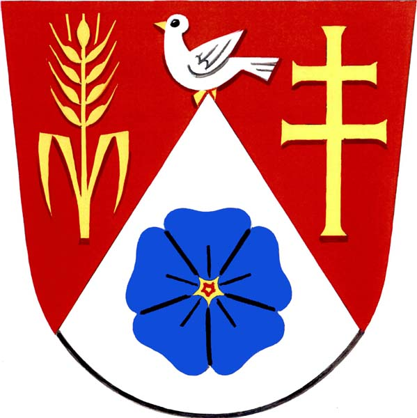 Znak obce Vítonice (okres Kroměříž)